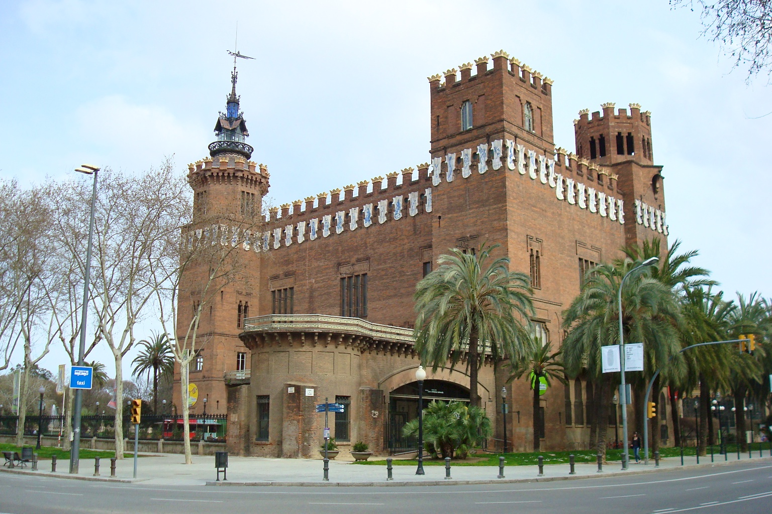 Zoologisches Museum (Barcelona)